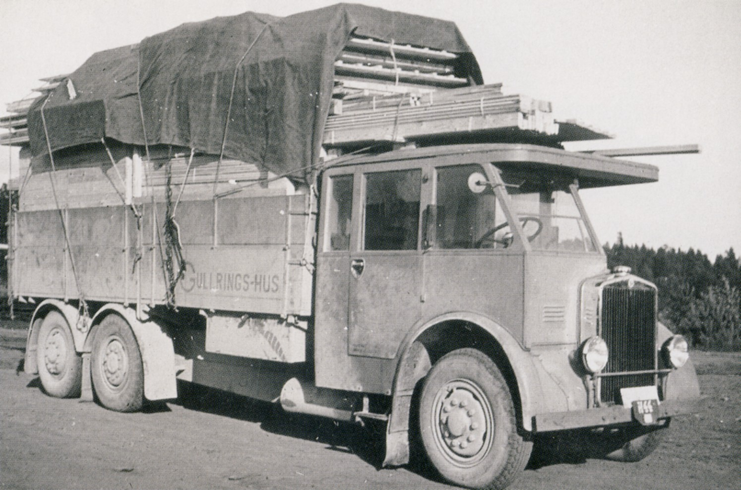 En transport från Gullringshus